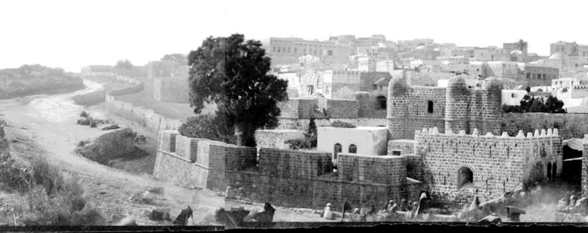 חומות יפו העתיקה בסביבות שנת 1860 - כיום כיכר השעון וחלקו הצפוני של רחוב יפת